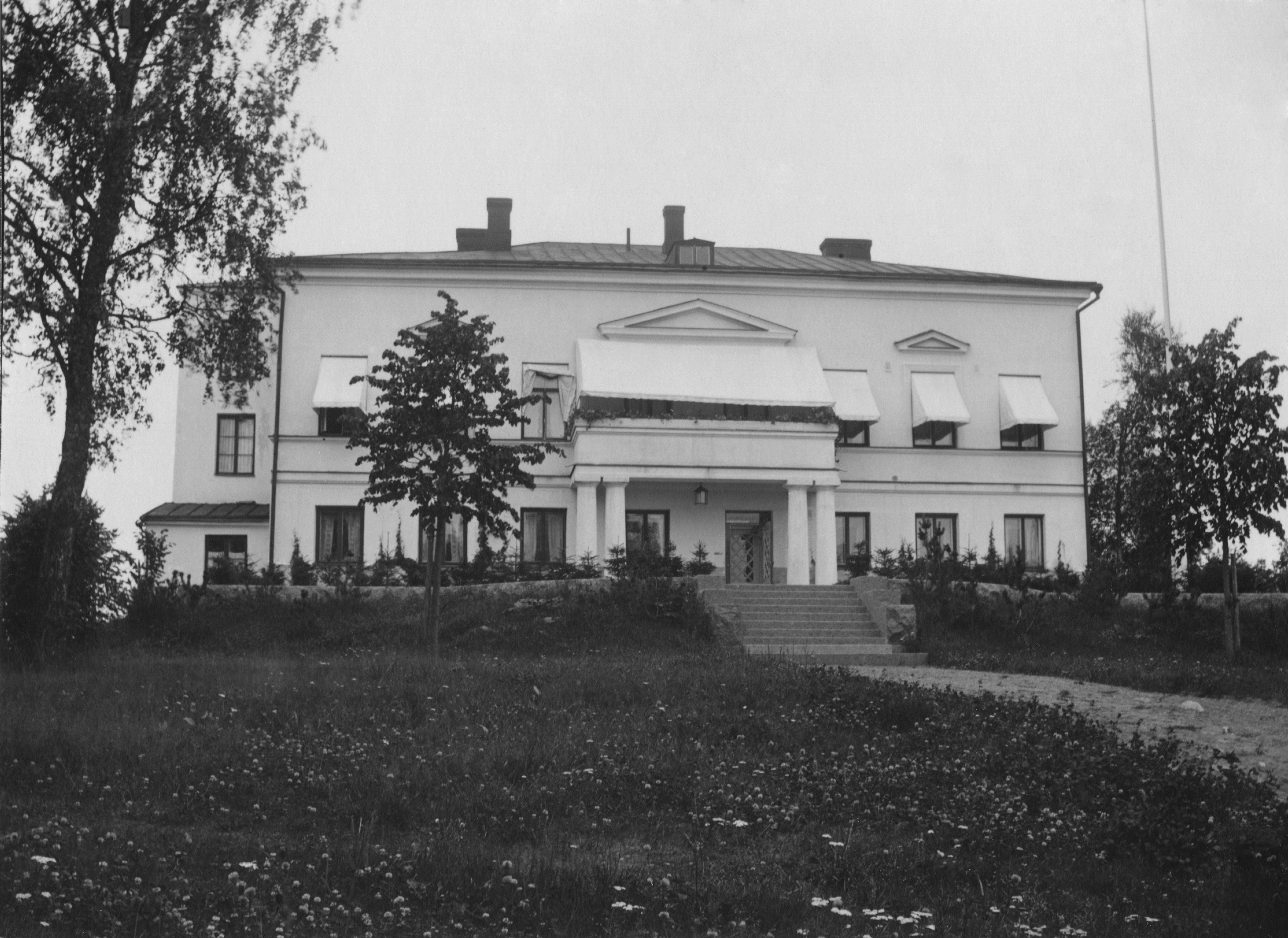 Lauttasaaren kartanon päärakennus.